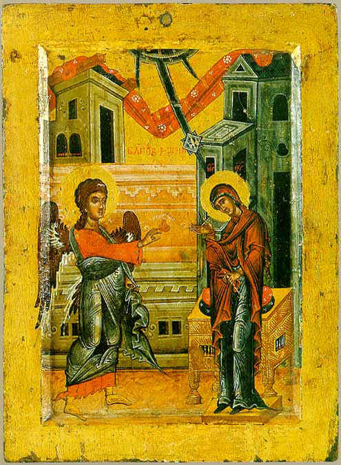 Благовештение. Димитар Зограф од с. Леуново - Мавровско. 1537-1543 год. 34,4 x 25,5 cm. Темпера. Гипсен грунд на штица. Од црквата Св. Јован Претеча - манастир Слепче, с. Слепче - Демирхисарско. Денес во музејот на Македонија, Скопје.